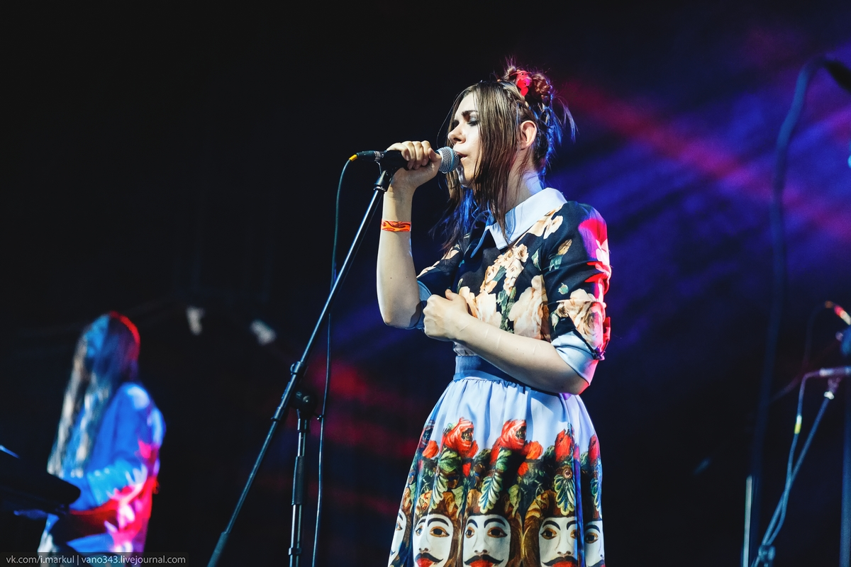 Фото Ивана Маркуля с концерта Theodor Bastard